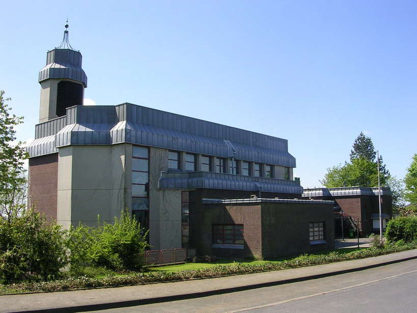 Kath. St. Matthias Kirche in Hackenberg - Stadt Bergneustadt